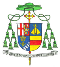 Franz-Peter Tebartz-van Elst * 20. November 1959, Bischof von Limburg seit 2008